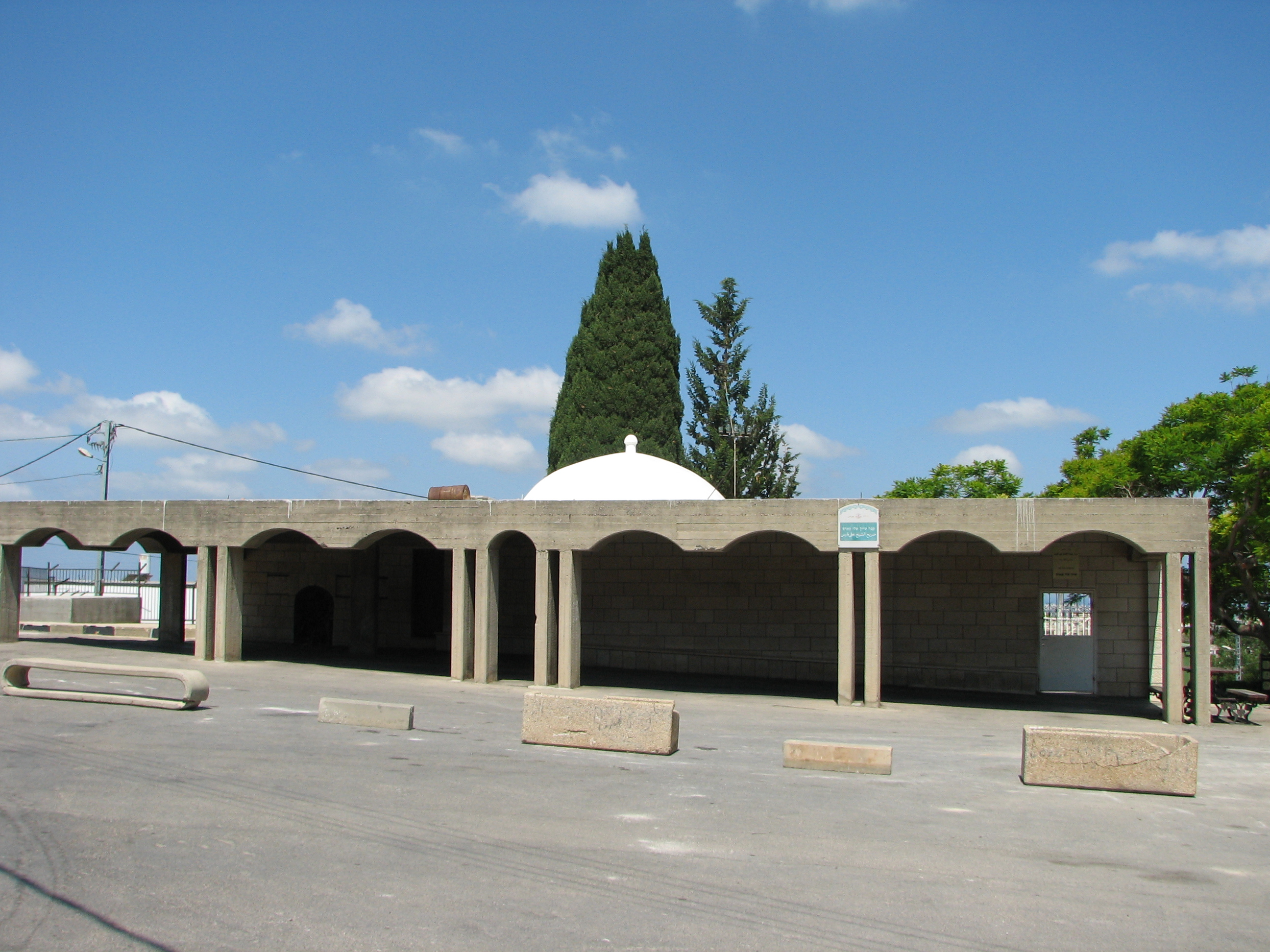 Grave of Sheikh Ali Fares in Julis Northern District of Israel. הקבר של שיח אעלי פארס הקבר שוכן ביישוב ג'וליס בגליל מתחם הקבר משמש גם כאנדרטה לחללי צה"ל בני העדה הדרוזית מג'וליס.